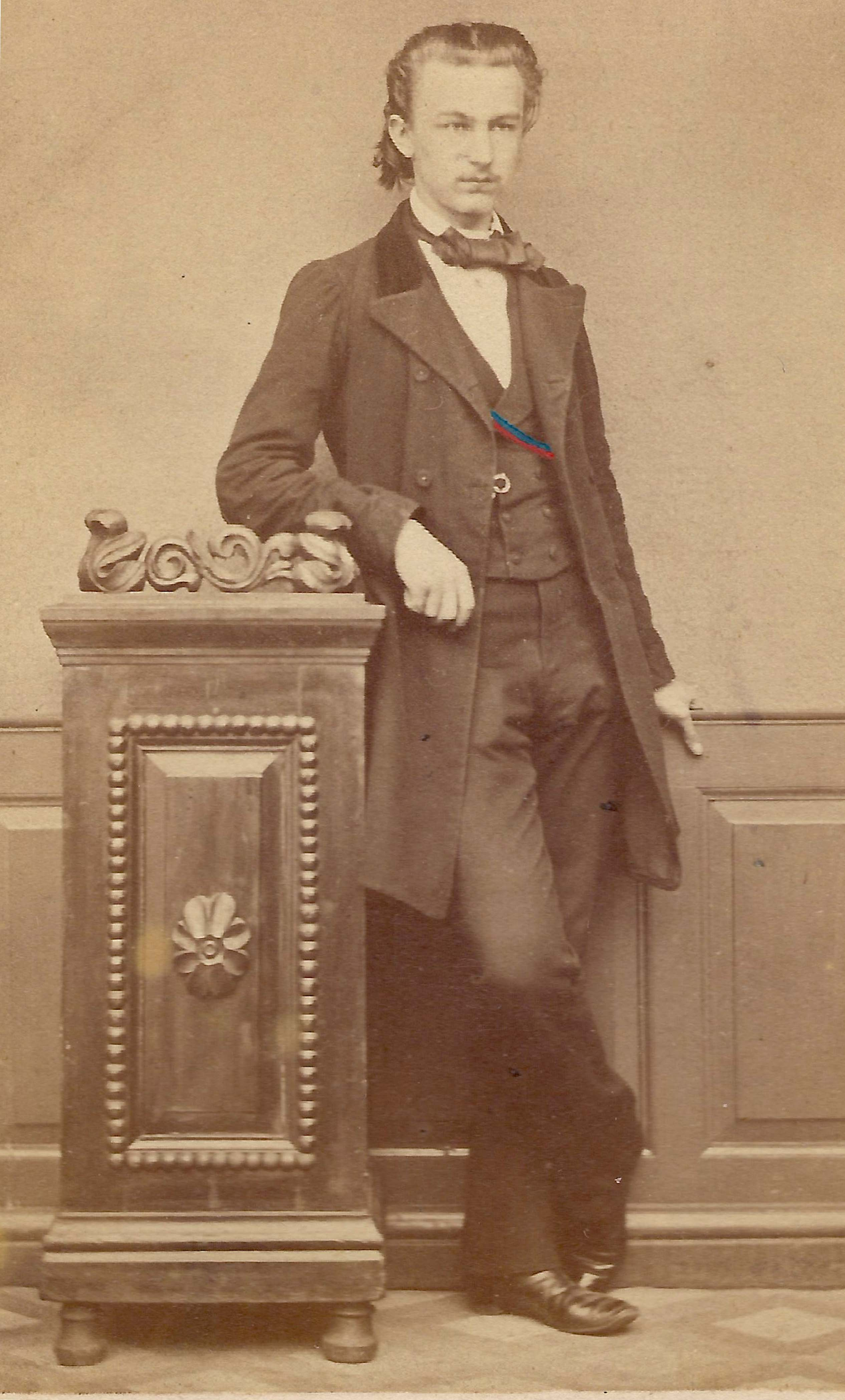 Alwin Lade als Fuchs des Corps Lusatia Leipzig